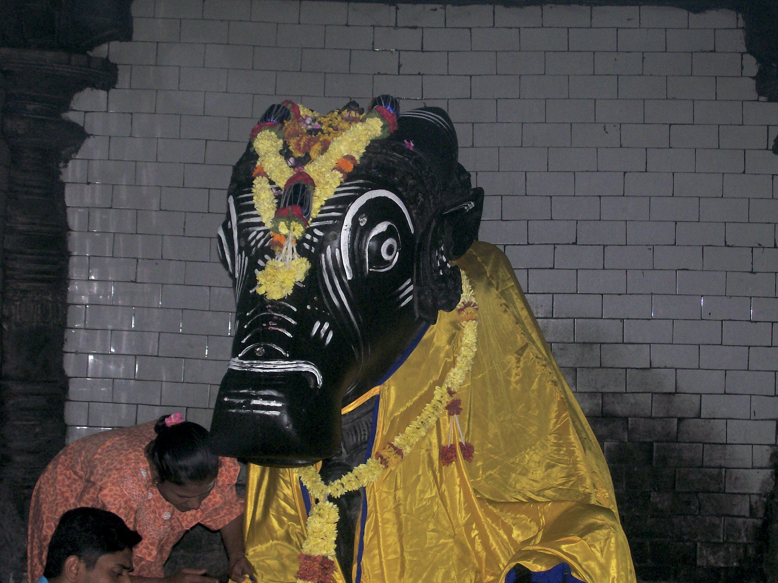 Shri Kuruvathi Basaveshwara